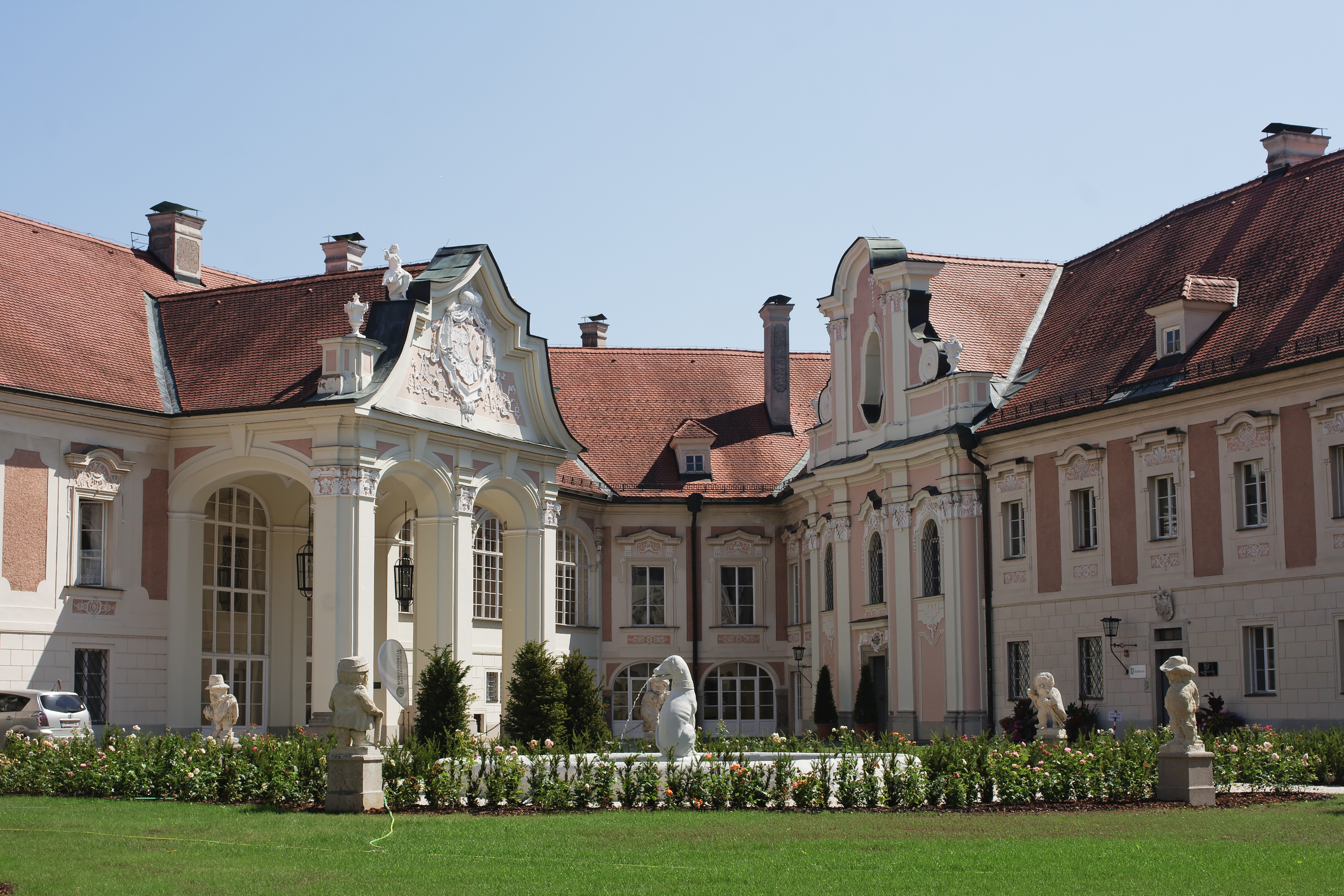 Lamberger Schlosshof mit Brunnen. Der Brunnen mit Hundeplastik und die Zwergenstatuen wurden 2014/15 restauriert. Das Bild zeigt den Stand kurz vor Abschluss der Arbeiten.